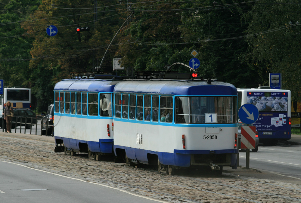 Plik był oryginalnie umieszczony w Łotewskiej Wikipedii: [1]